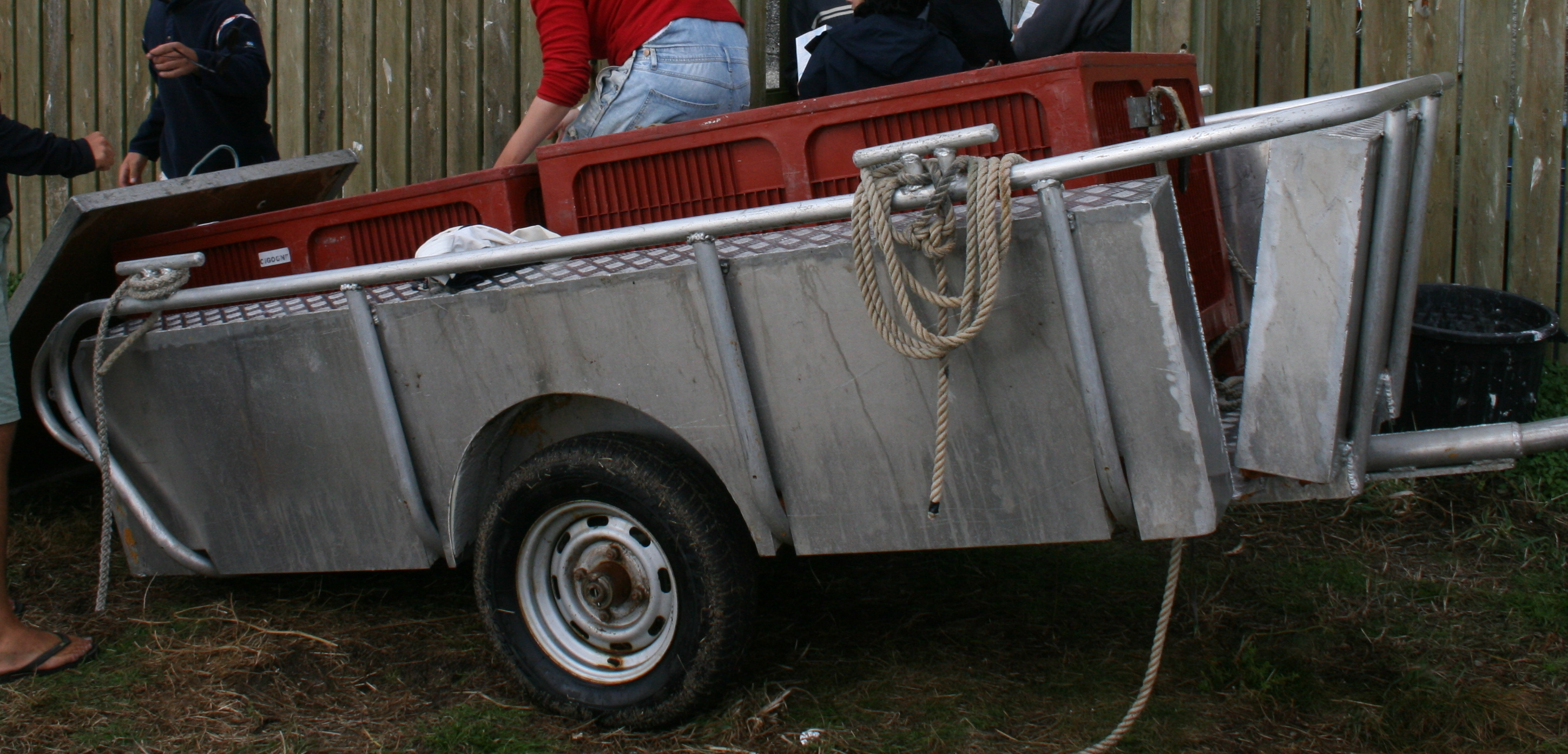 La "Cadillac", sorte de remorque-amphibie, utilisée pour décharger l'avitaillement sur les îles de l'archipel. Ici en train d'être déchargée sur l'île de Cigogne.